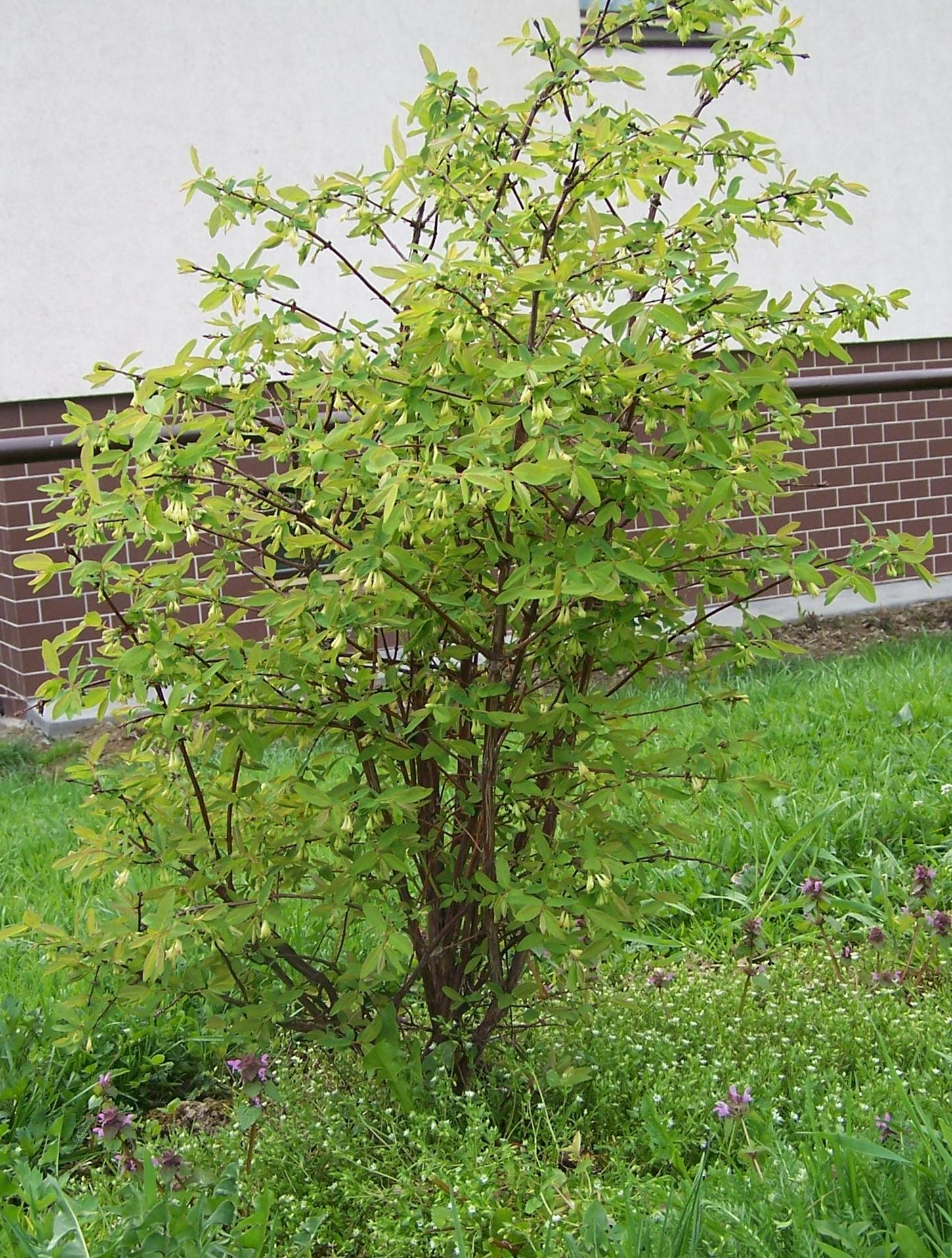 Lonicera coerulea (pl. wiciokrzew siny, jagoda kamczacka)